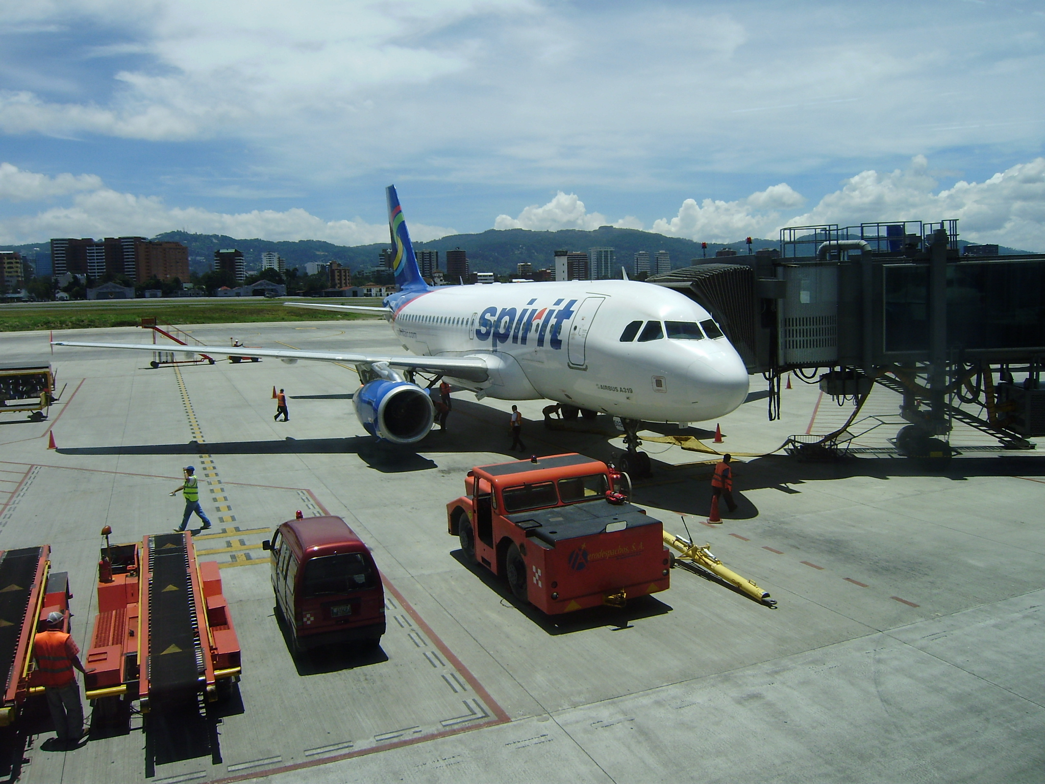 Hangar del Aeropuerto Internacional de la Aurora, Ciudad de Guatemala.